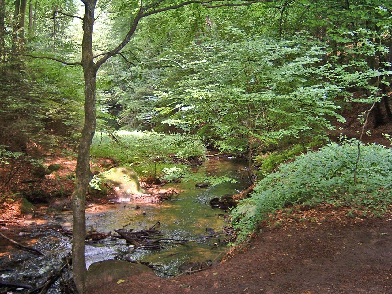 Moosalbe im Naturschutzgebiet „Karlstalschlucht“